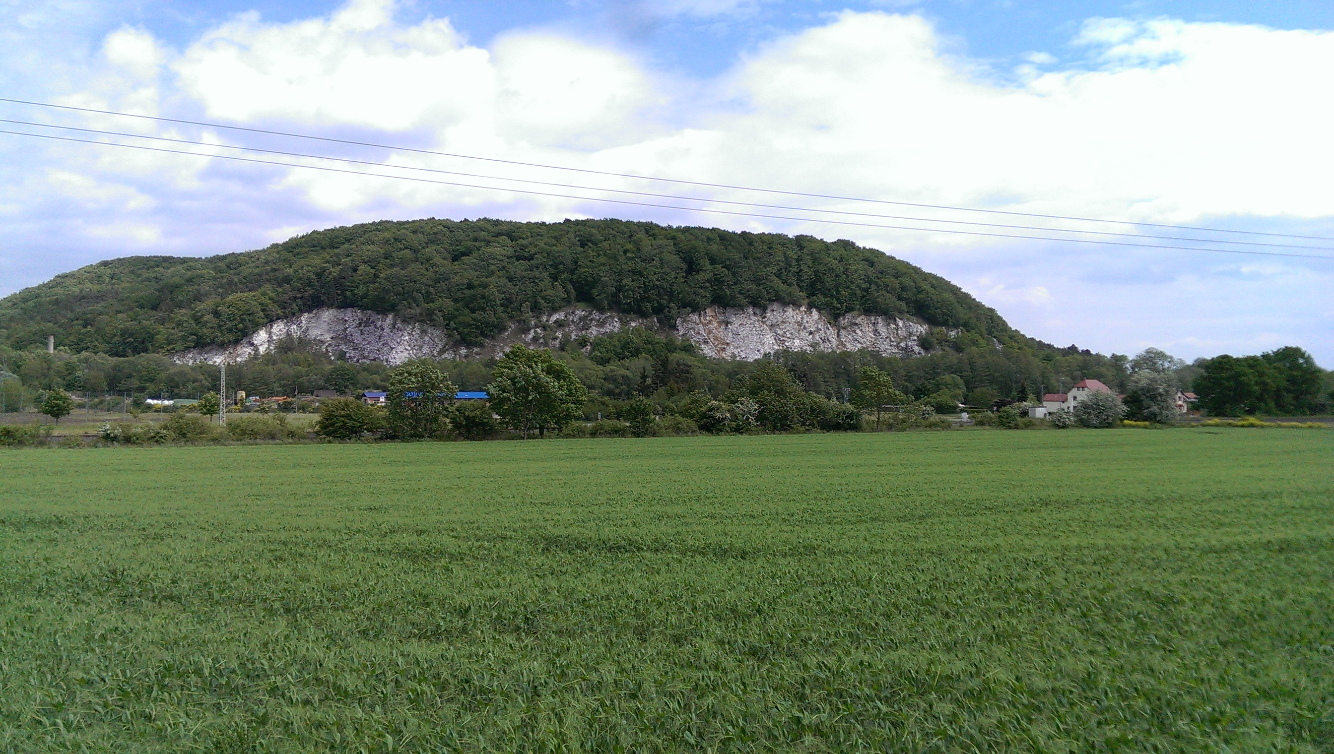 Himmelsberg bei Woffleben im Landkreis Nordhausen (Thüringen).